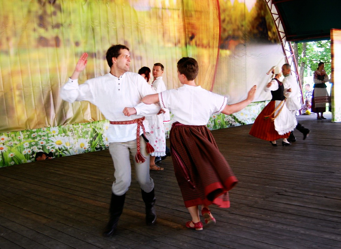 Беларуская (тарашкевіца): Берагіня 2014, танец Каваль